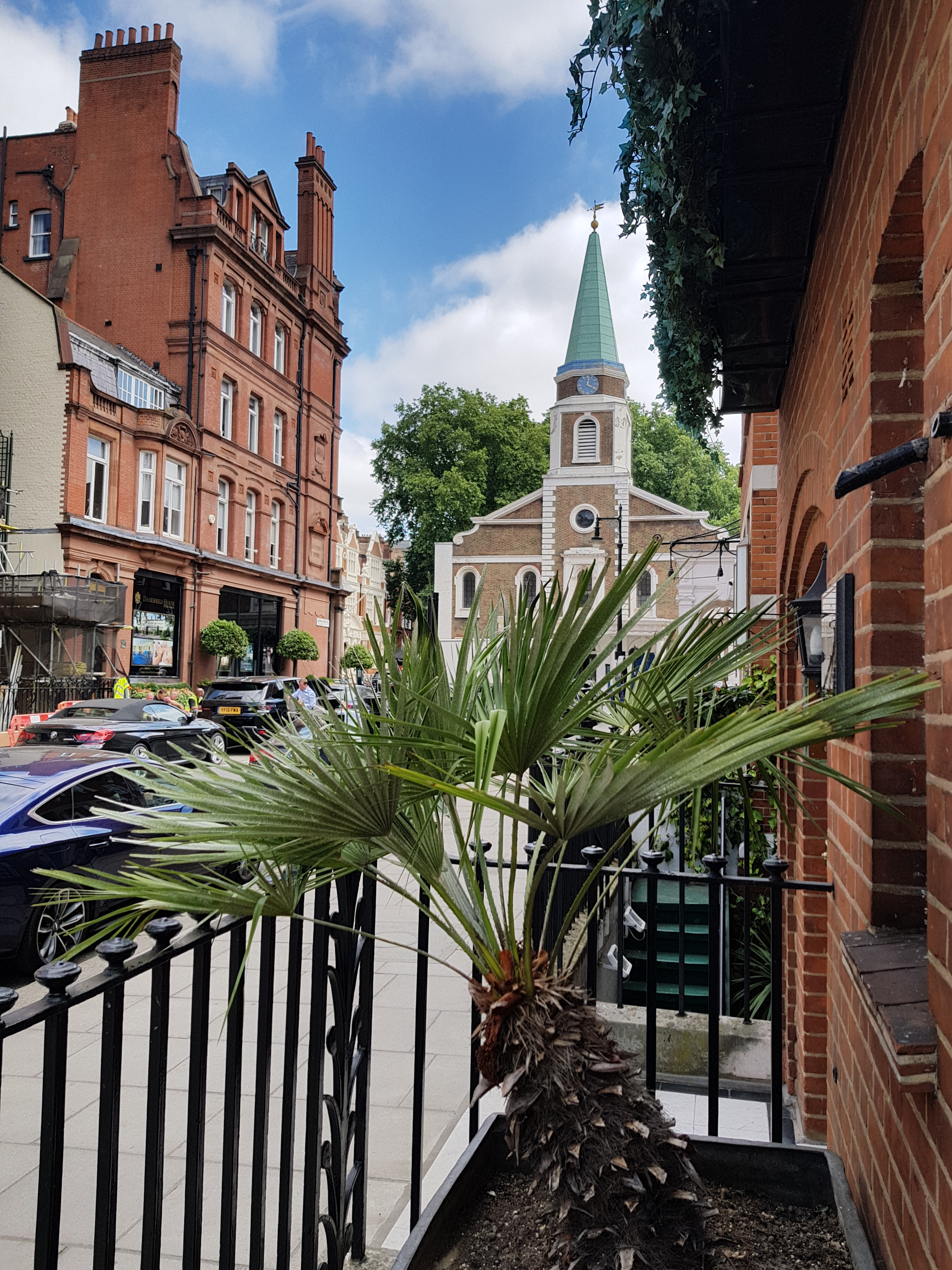 Grosvenor Chapel, Londres.